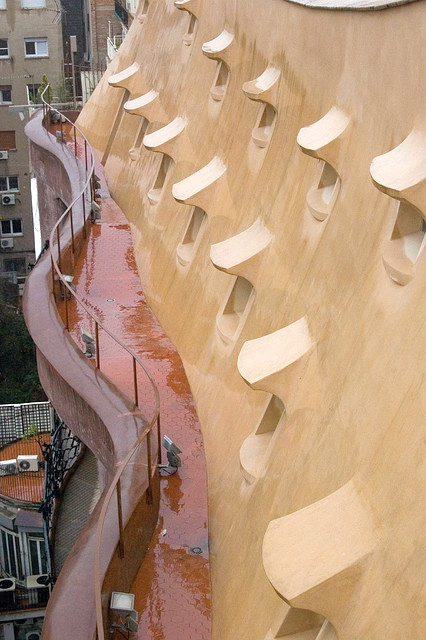 Finestrelle e terrazza de la Casa Milà (Barcelona-Catalunya)